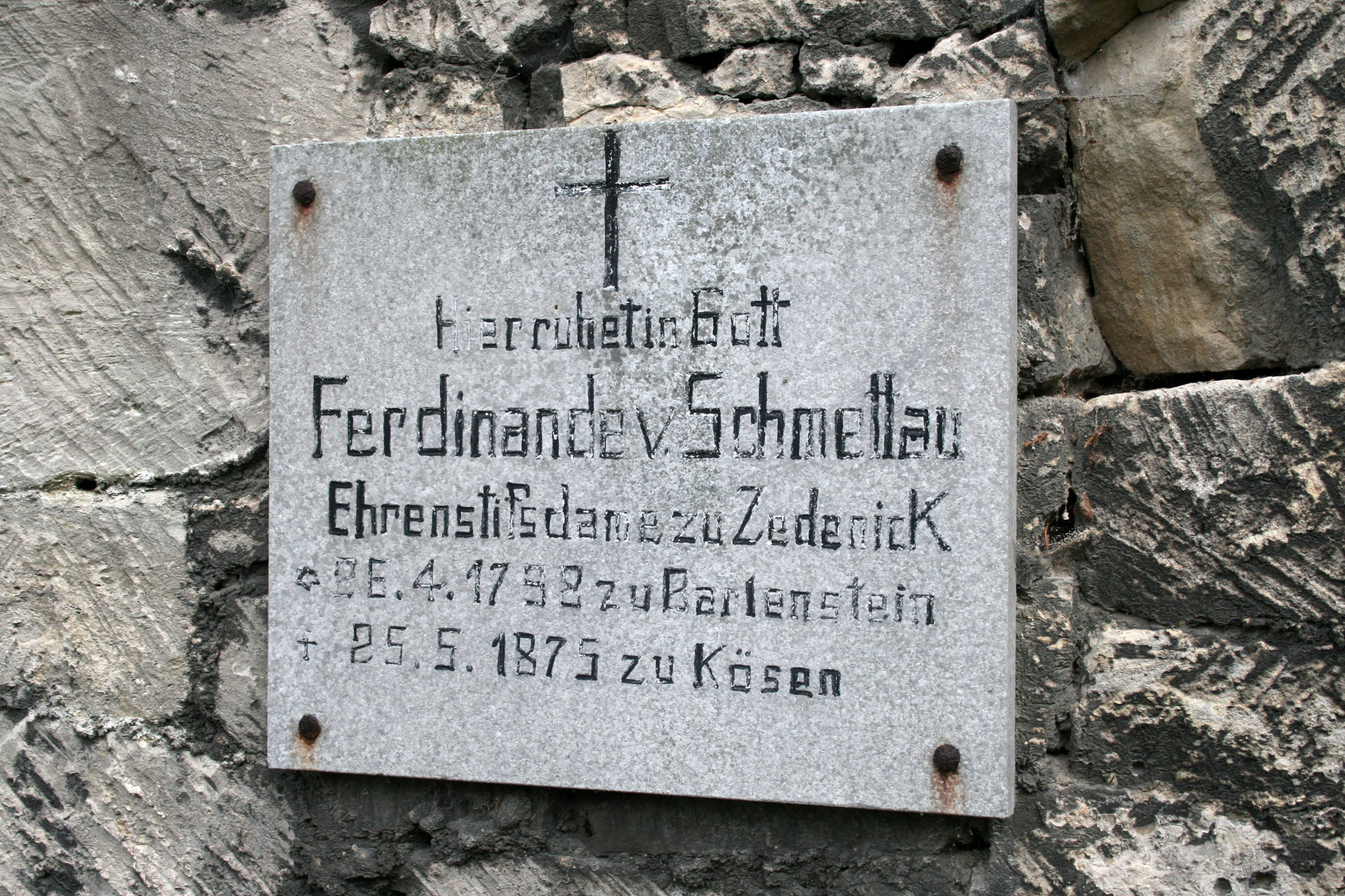 Ferdinande von Schmettau - Grab in Bad Kösen